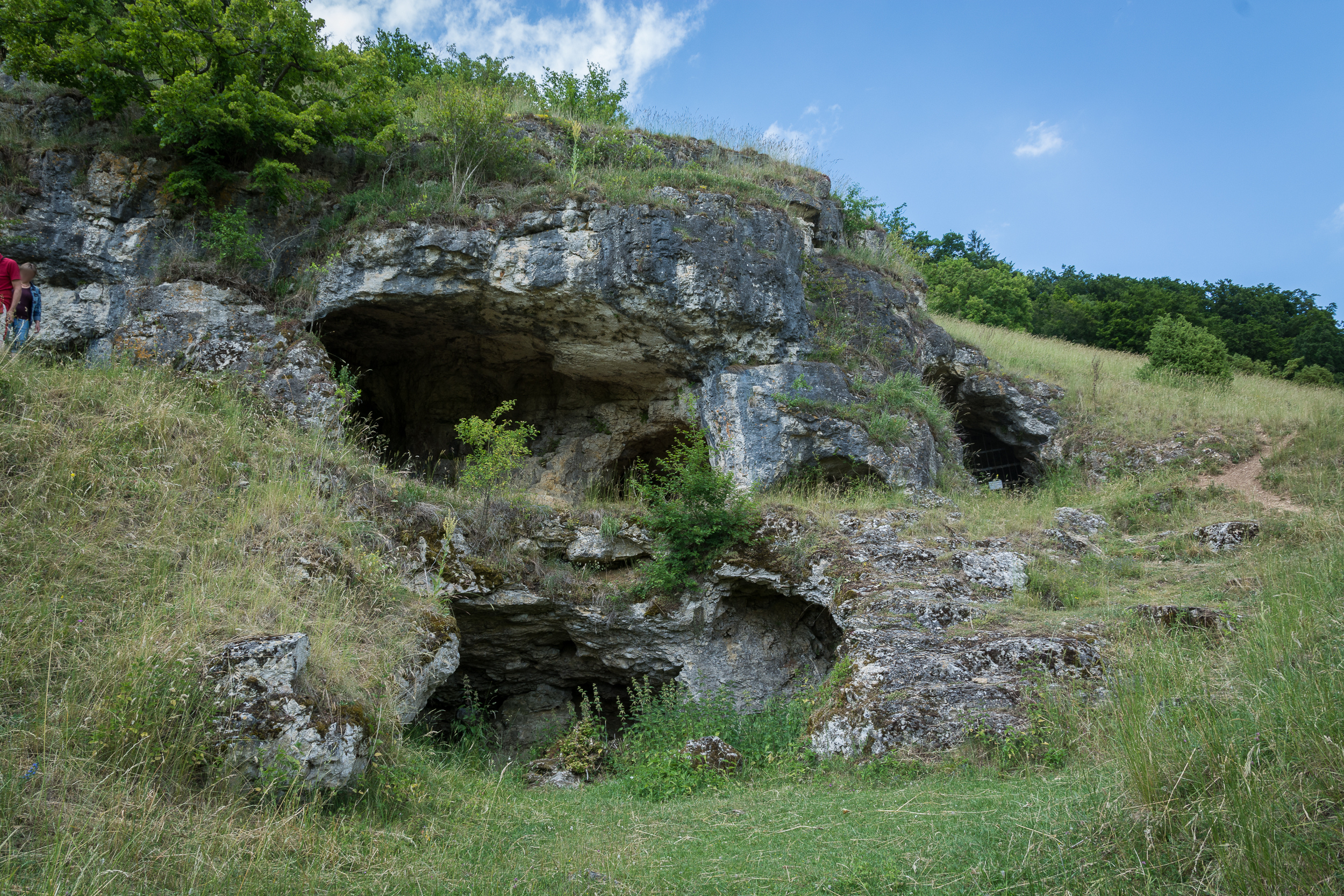 Die Mauerner Höhlen bei Mauern.